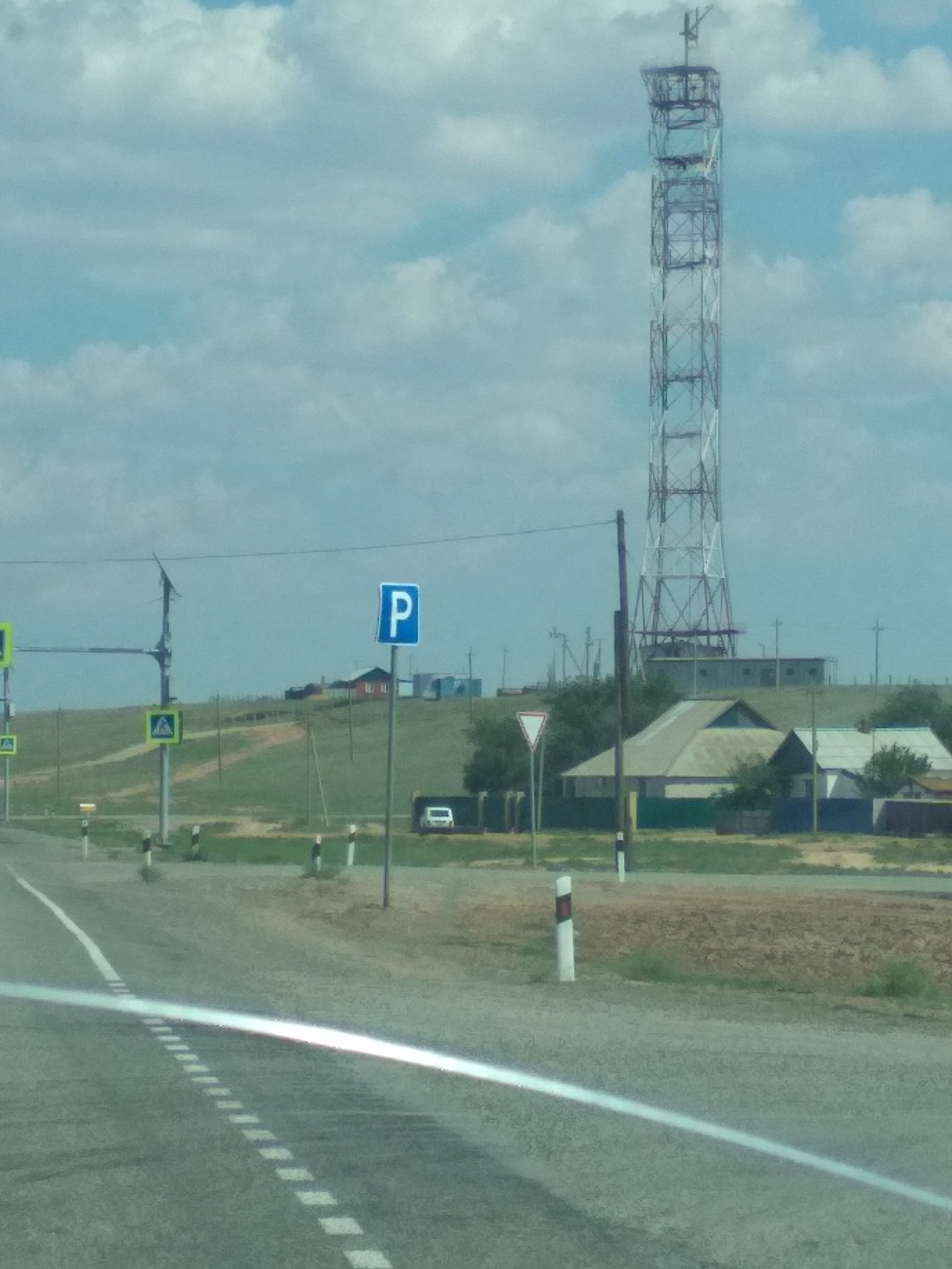 Нохчийн: Хулхутара телебIов